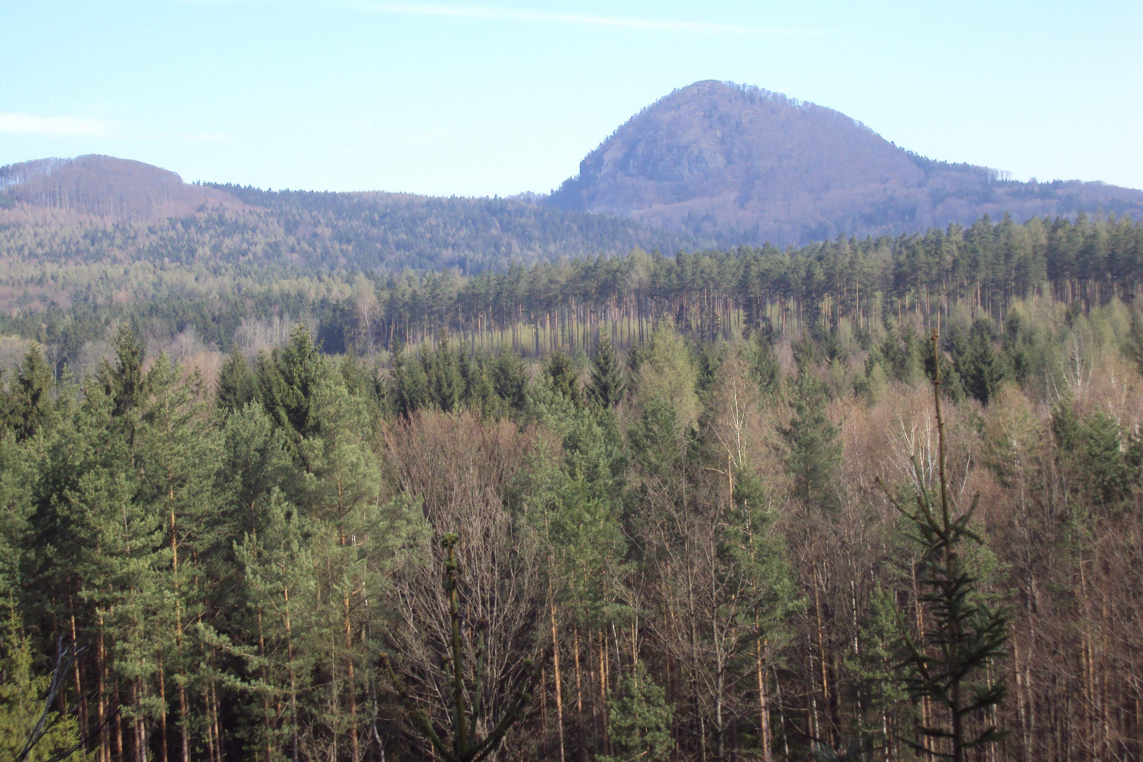 Hora Klíč v Lužických horách z jihu